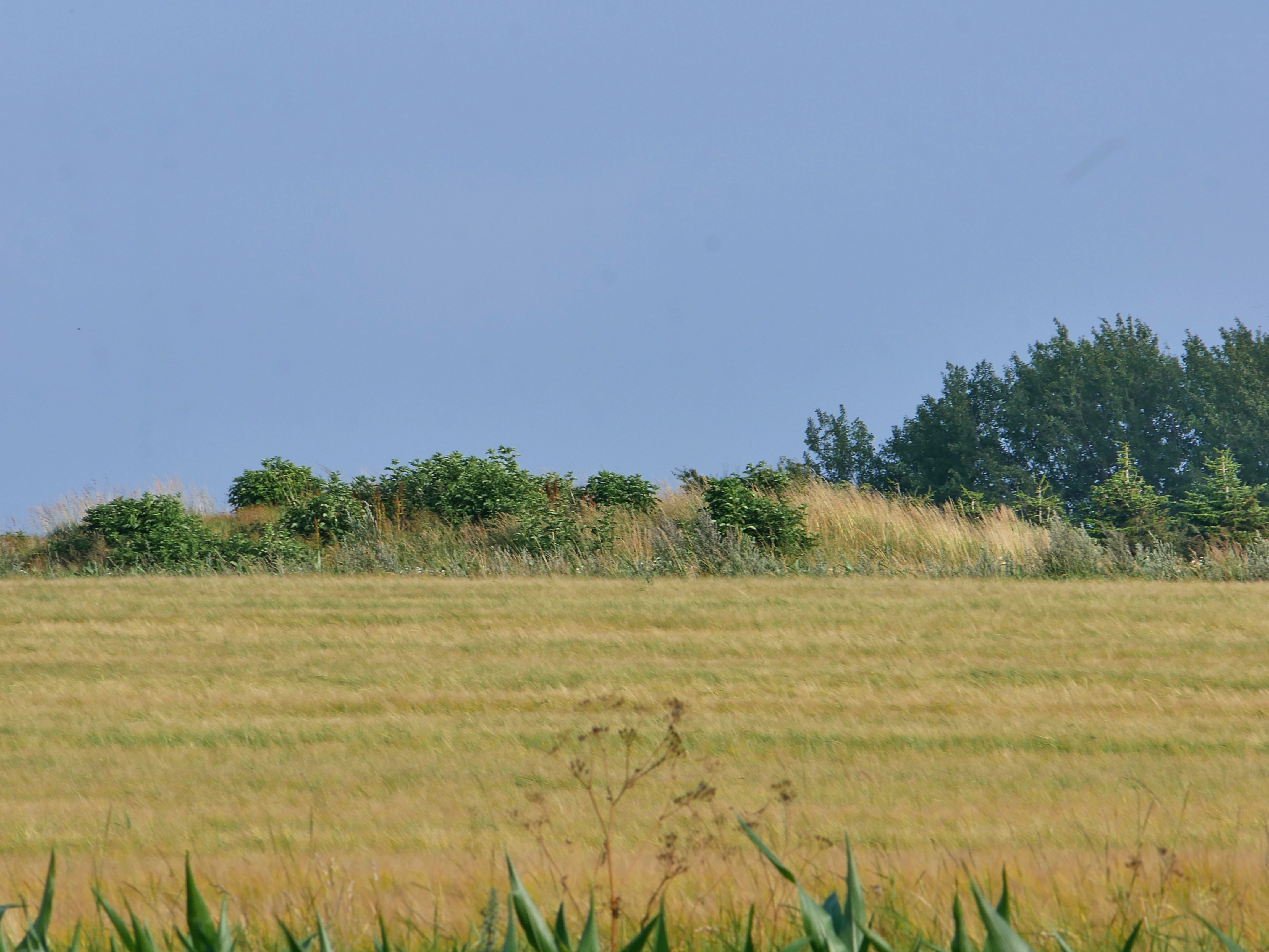 Dolmen Süd in Tostrup von WNW